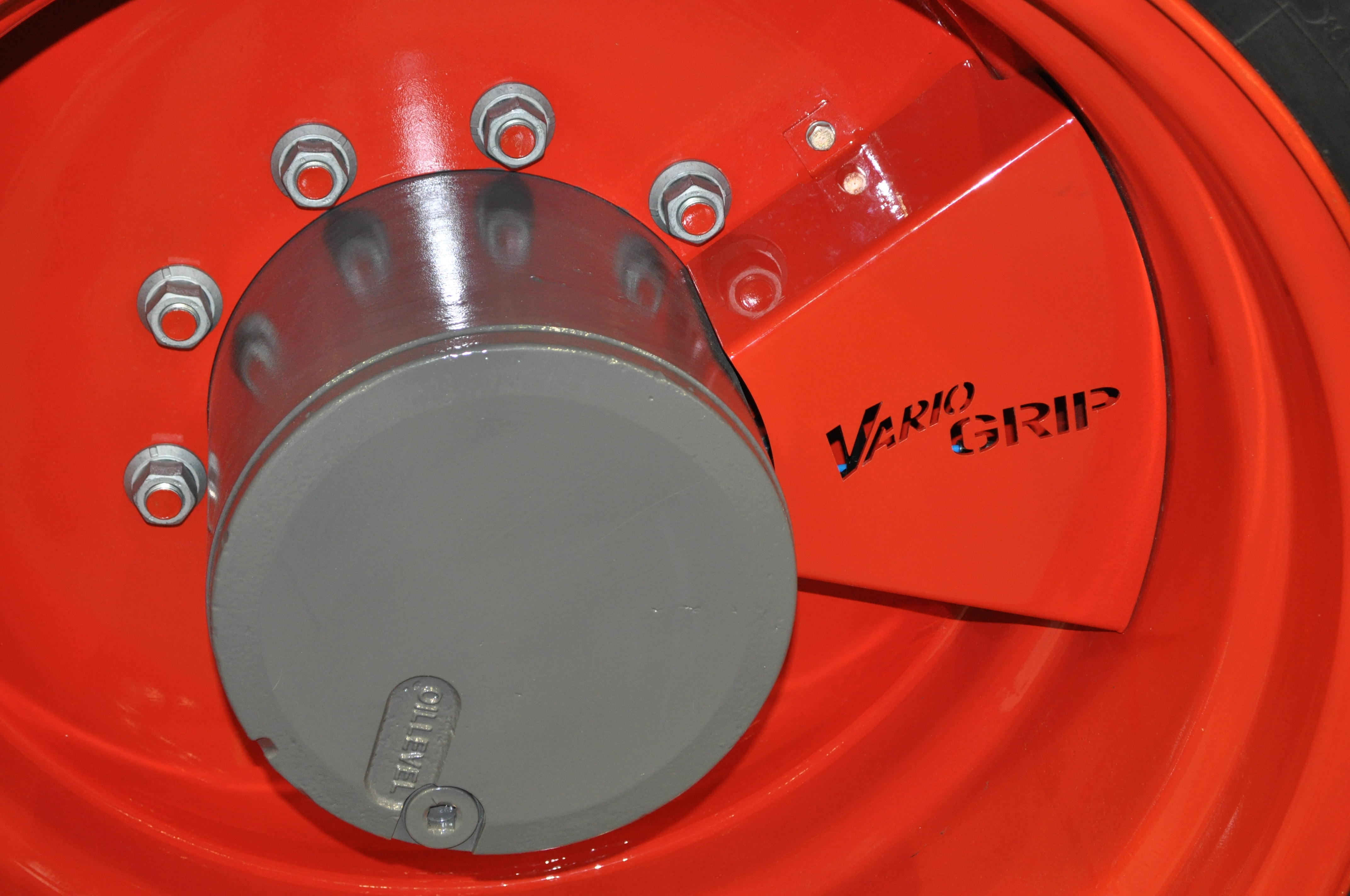 Drukregelsysteem in het voorwiel